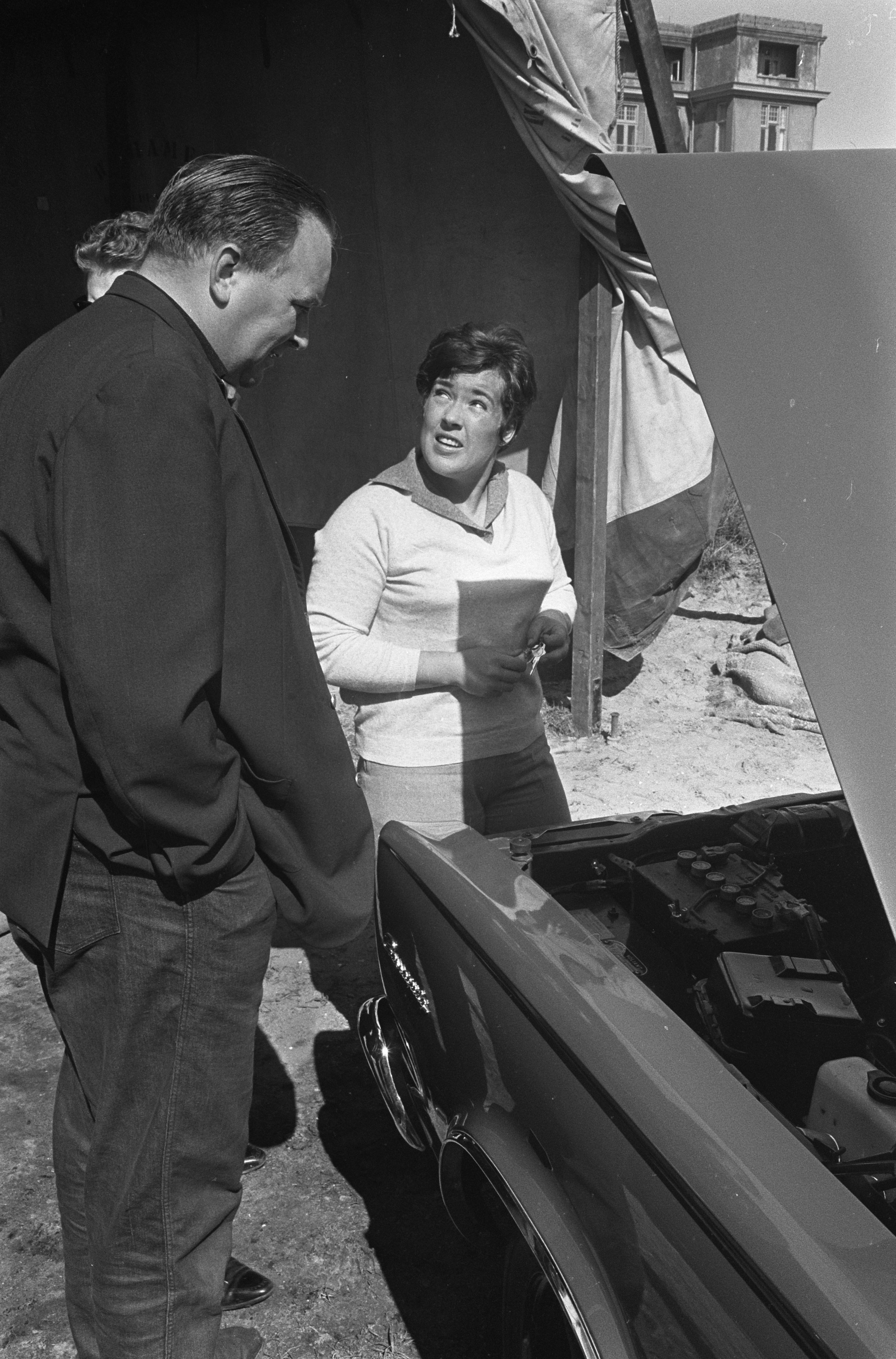 Collectie / Archief : Fotocollectie Anefo Reportage / Serie : [ onbekend ] Beschrijving : Voorbereidingen Tulpenrallye, Pat Moss en Erik Carlsson Datum : 25 april 1966 Locatie : Noordwijk, Zuid-Holland Trefwoorden : autorally's, autosport, sport Persoonsnaam : Carlsson, Erik, Moss, Pat Instellingsnaam : Tulpenrally Fotograaf : Koch, Eric / Anefo Auteursrechthebbende : Nationaal Archief Materiaalsoort : Negatief (zwart/wit) Nummer archiefinventaris : bekijk toegang 2.24.01.05 Bestanddeelnummer : 919-0697